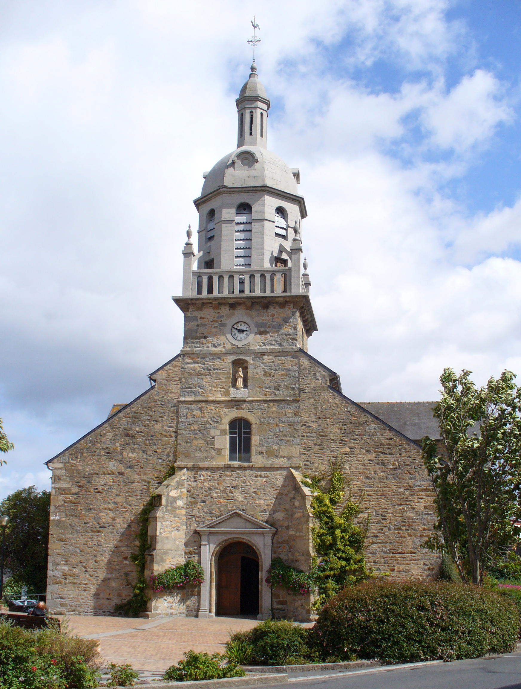 Eglise de Langueux